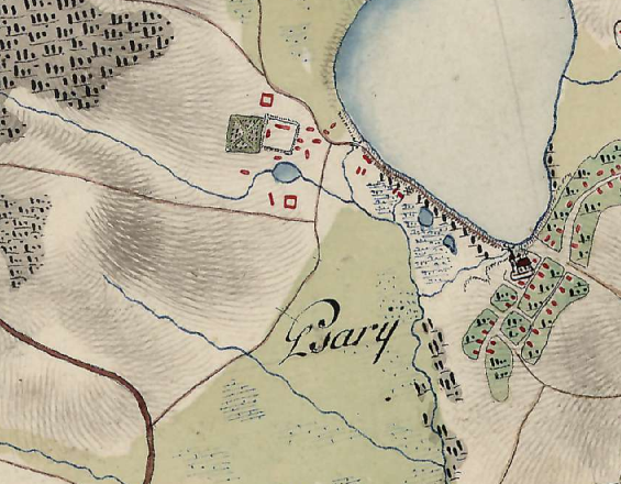 xviii